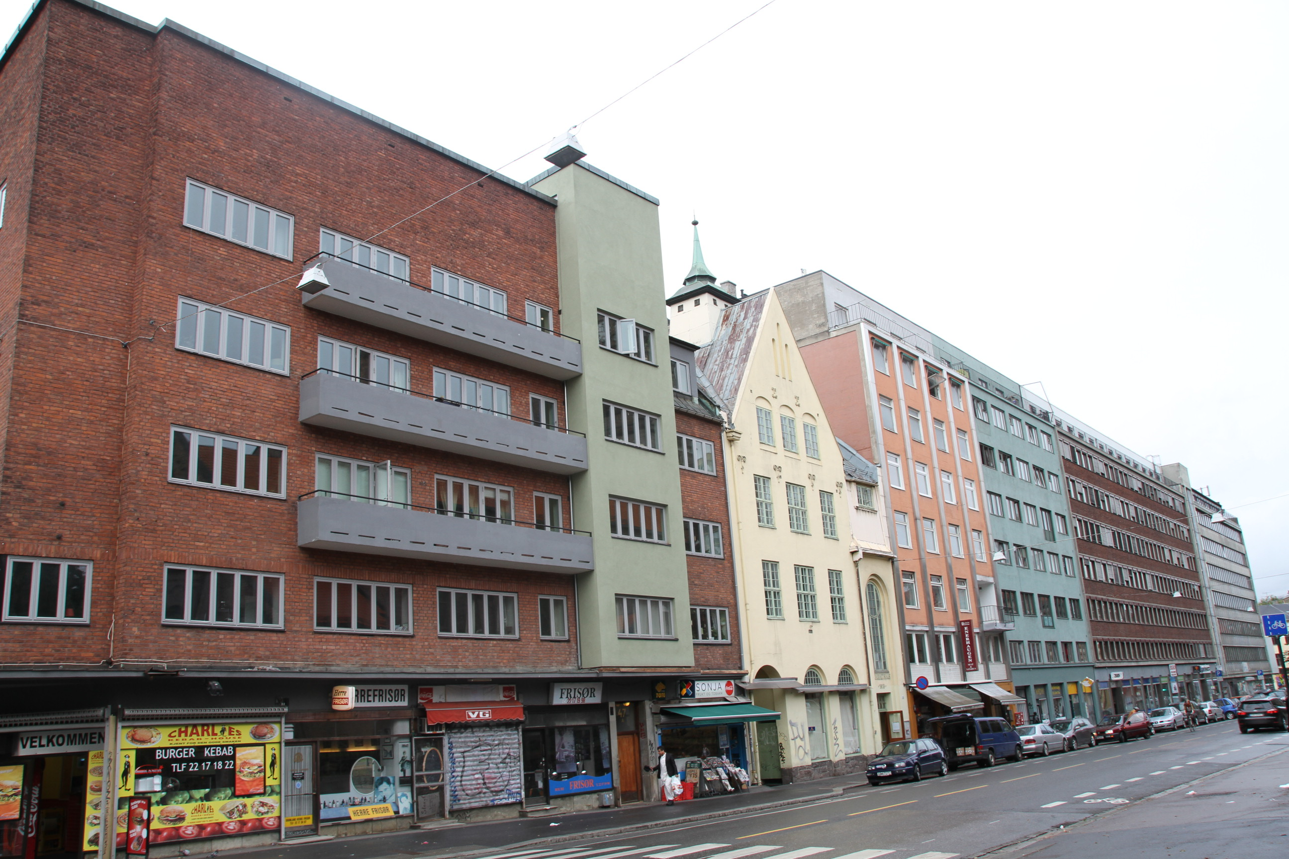 Motiv fra Grønlandsleiret, Oslo. Området har nasjonal verneinteresse